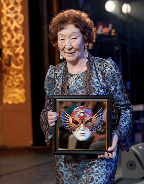 Анна Кузьмина - Фотограф Дмитрий Дубинский 2014